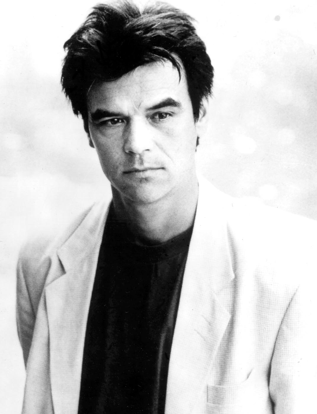 Nederlands muzikant en zanger